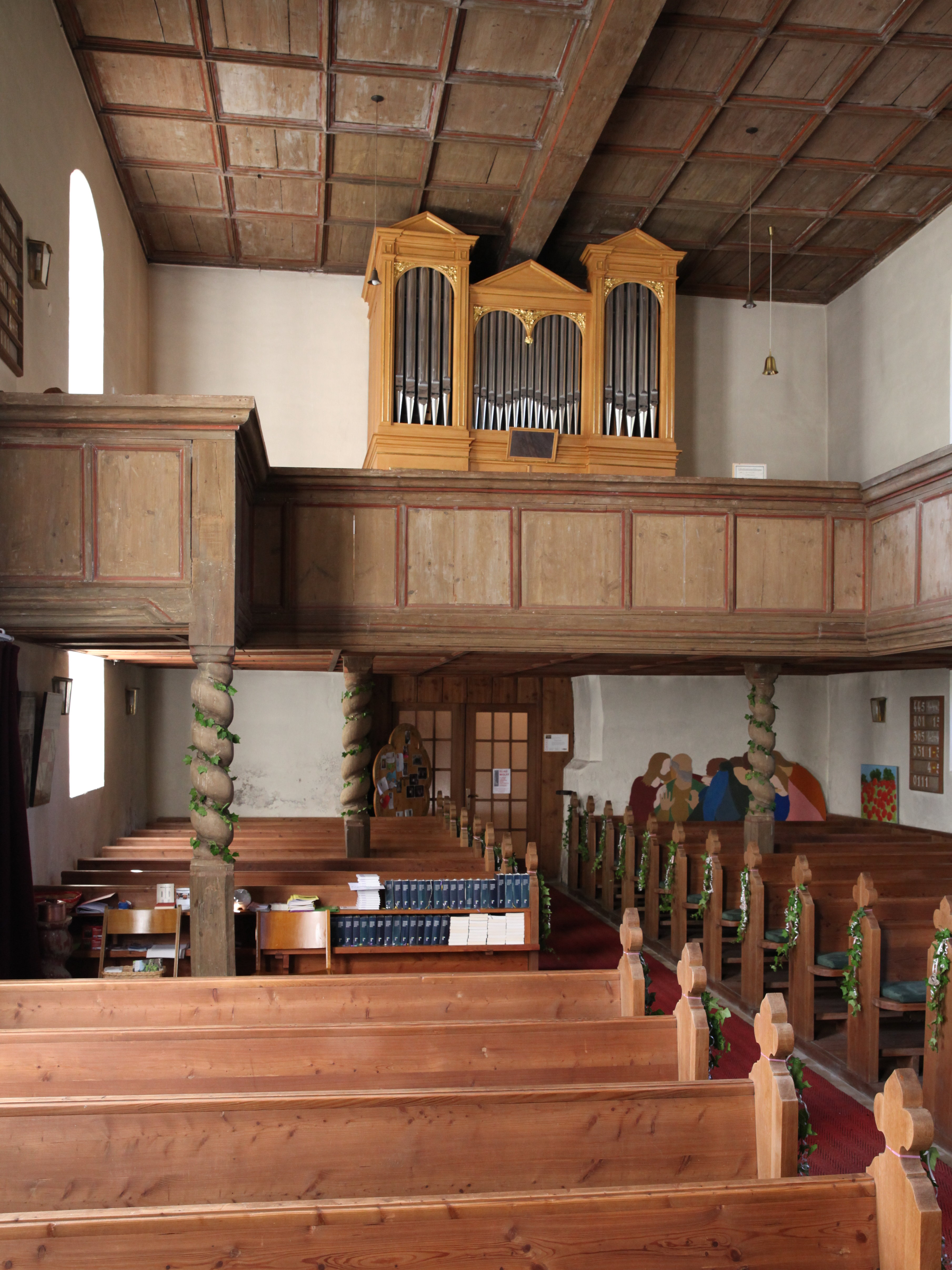 evangelisch-lutherische Kirche St. Pankratius in Schottenstein, Itzgrund